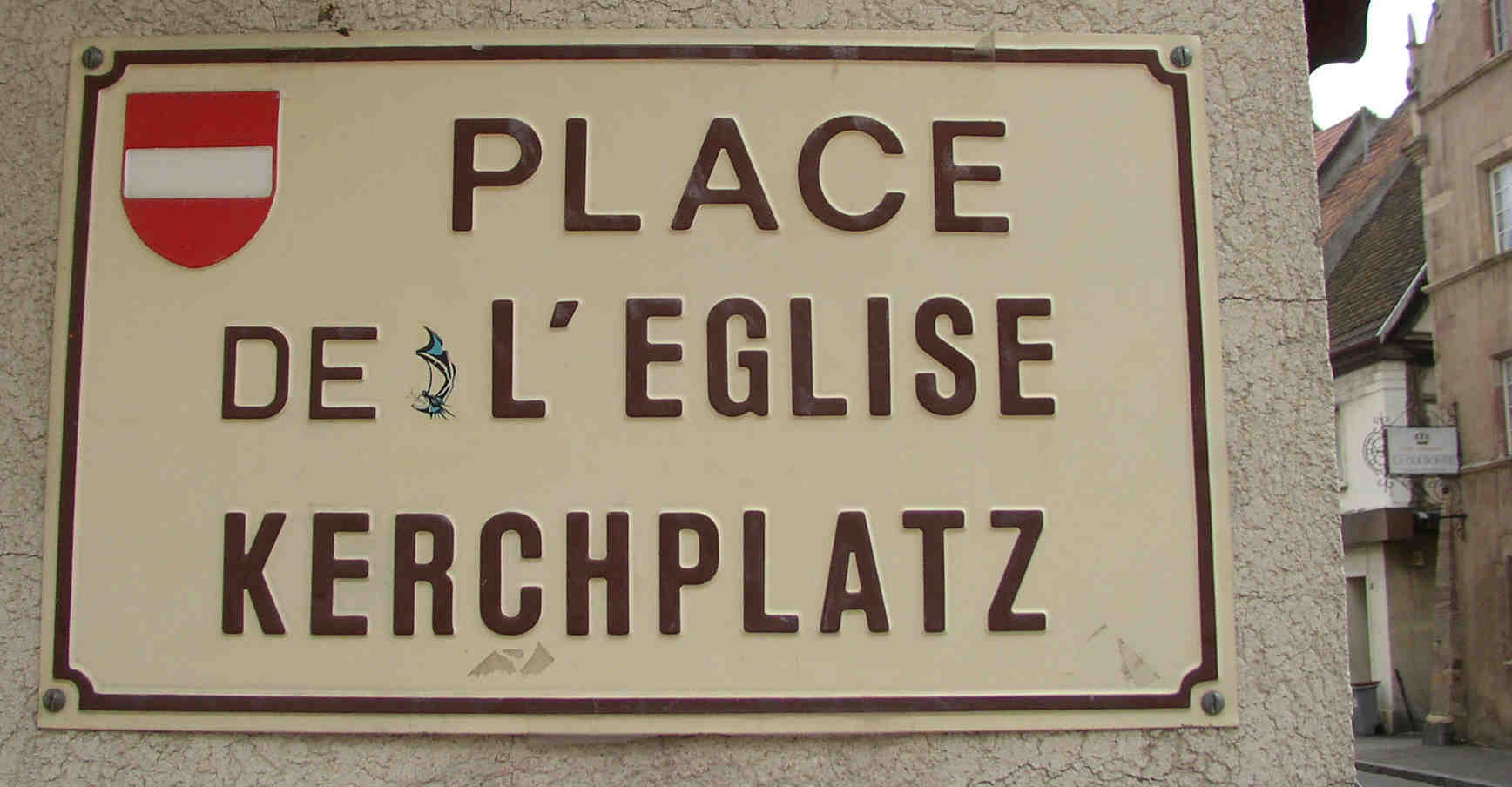 Foto vume Sroßeschild z Änse Bschriibig: Z Änze sin verschiidini Stroßeschilder zweisprochig - franzesisch un elsässisch. Des Bild isch unter dr GNU Freiji Dokumentationslizenz vereffentligt un derf unter dr Bedingige vu däre Lizens kopiärt, verbreitet un veränderet wäre.